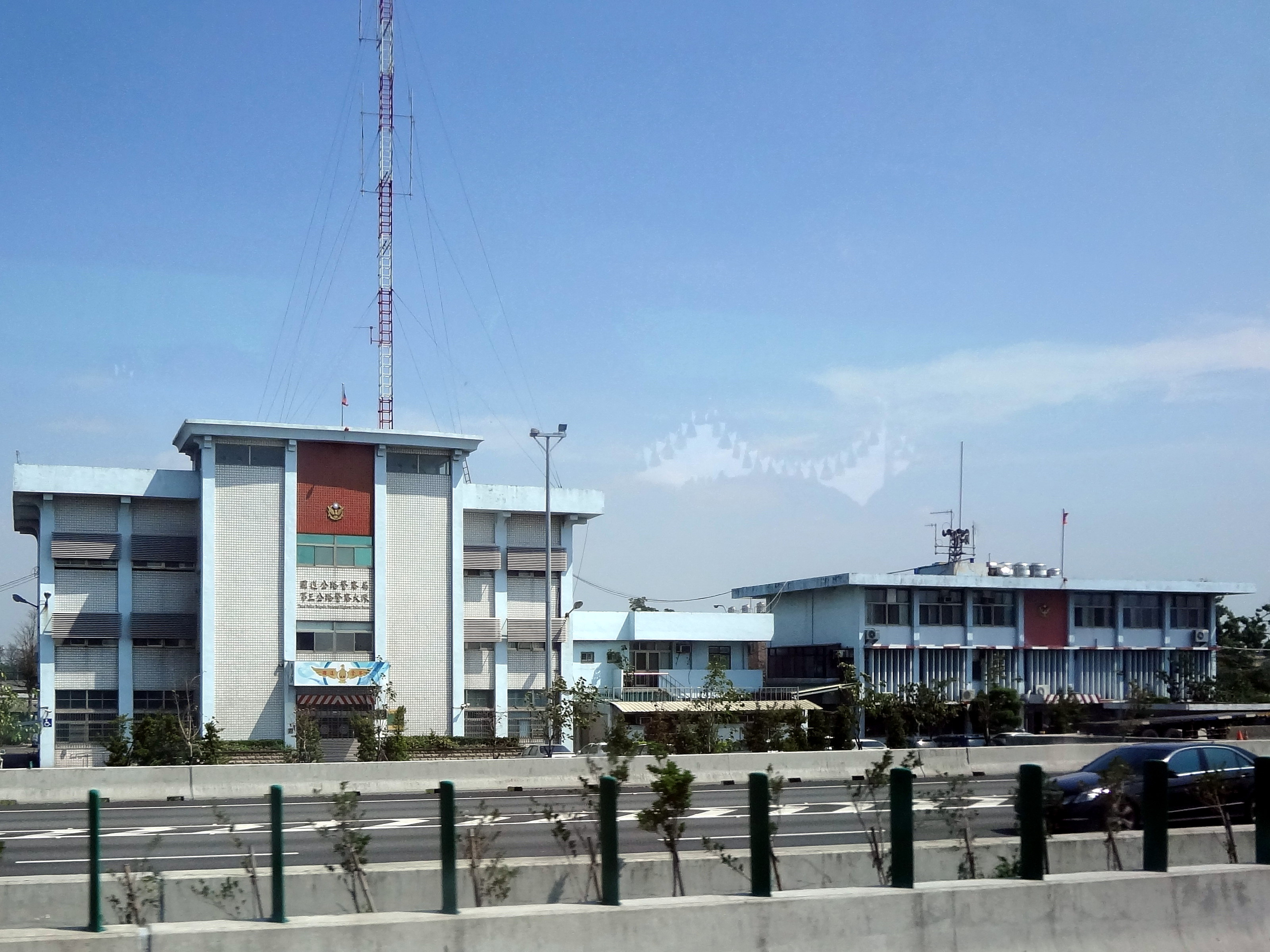 內政部警政署國道公路警察局第三公路警察大隊隊部，位於臺灣彰化縣埤頭鄉和豐村埔尾路52之2號。本照片係於遊覽車上拍攝。